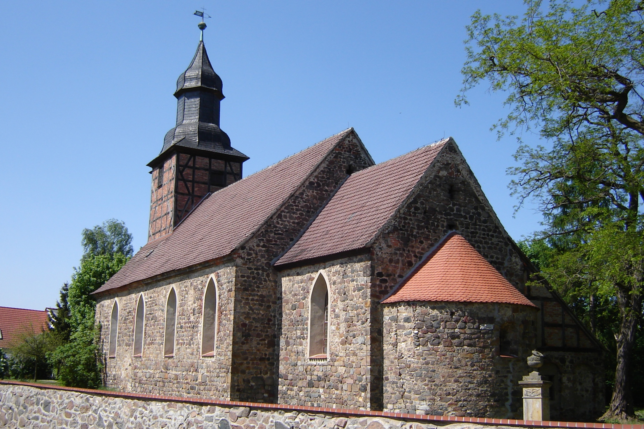 Möckern-Stegelitz, Kirche